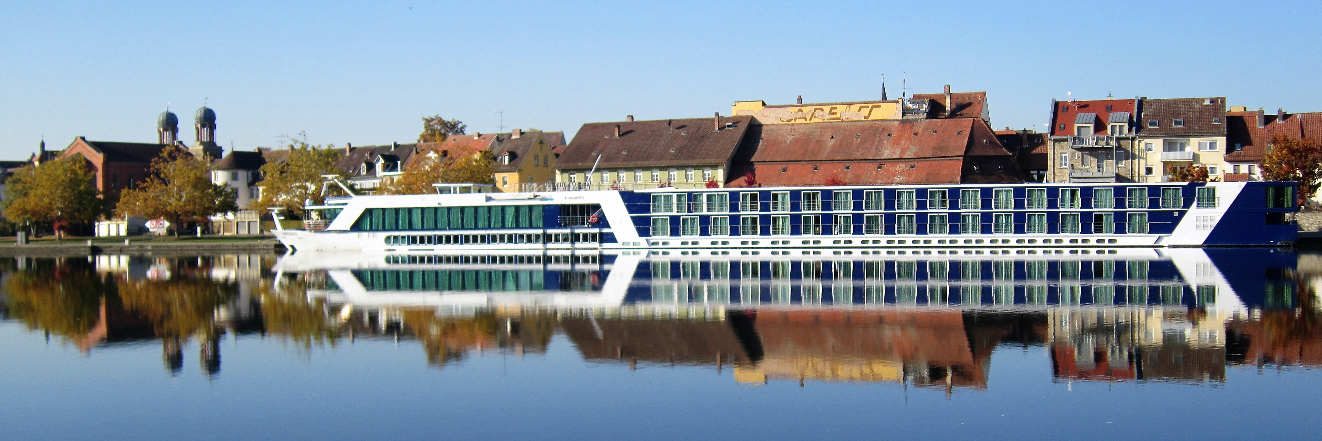 Kreuzfahrtschiff auf dem Main in Kitzingen